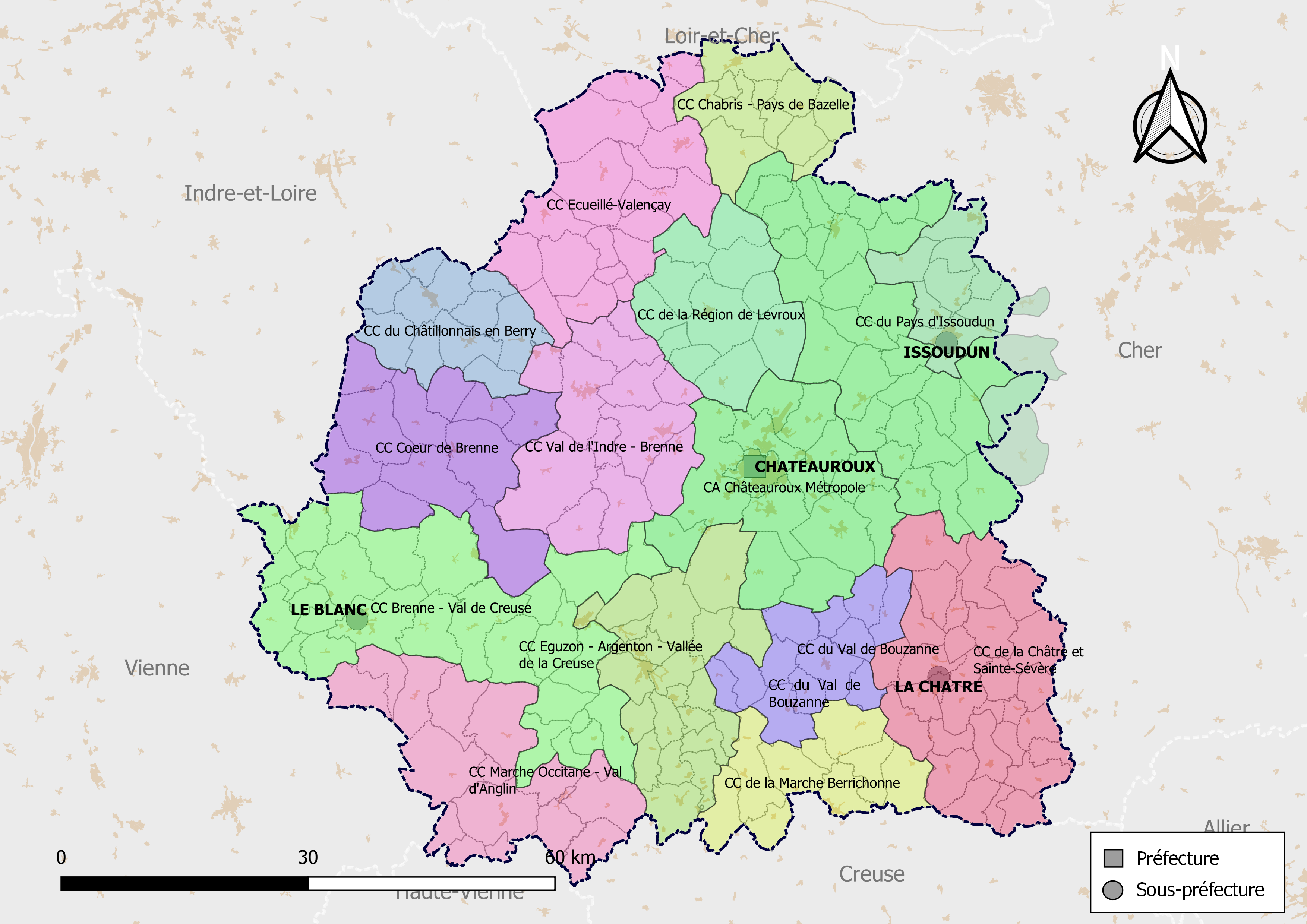 Carte des intercommunalités du département de l'Indre, France. Composition au 1er janvier 2019.